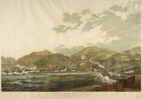 Le général Dallemagne à la tète de l'avant-garde française, lors de la campagne d'Italie de Napoléon 1er, traversant la rivière Lavis et le village de Lavis en Italie en 1796.